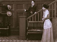 Charlie Chaplin en una escena del filme The Star Boarder (1914).